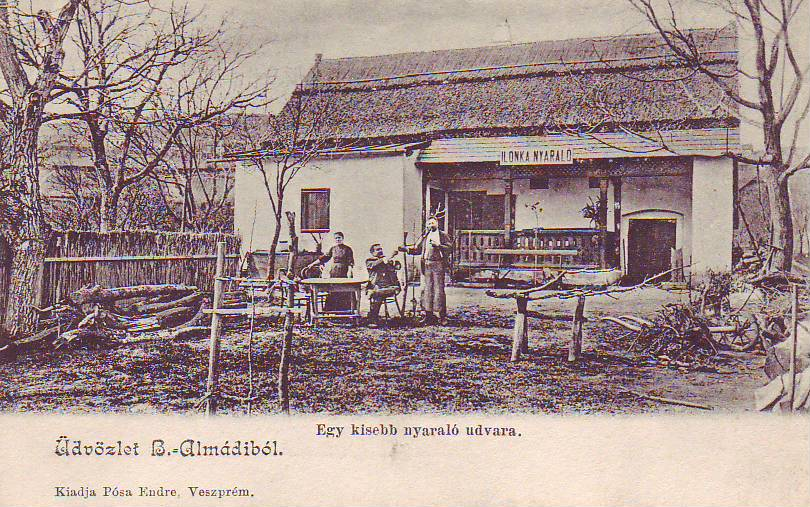 Balatonalmadi (Hungary) in about 1900